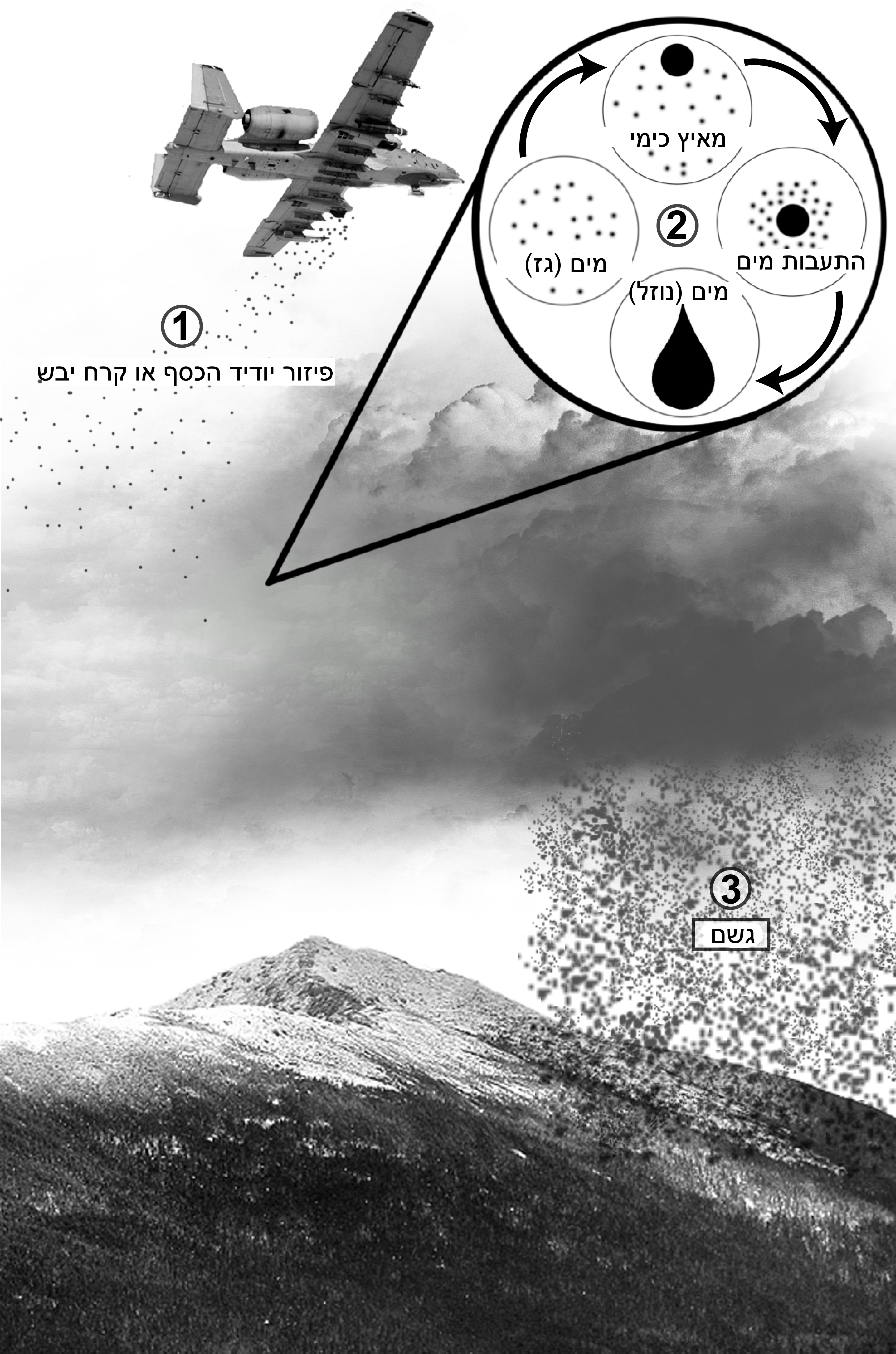 זריעת עננים